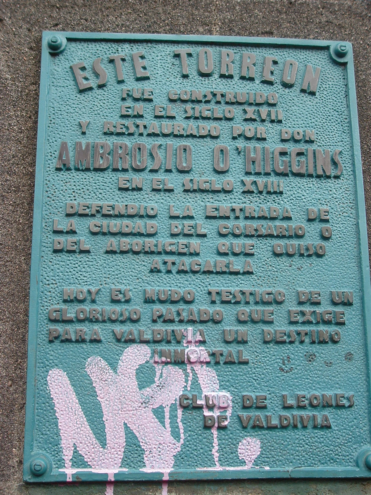 Vista al letrero del Torreón Los Canelos This is a photo of a national monument in Chile: 173